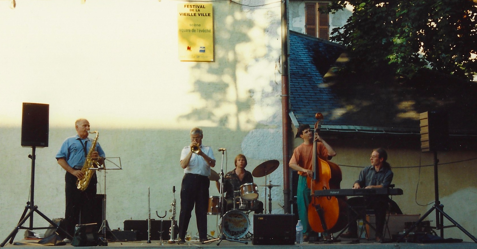 Antoine Laville et son groupe se produisent au podium de l'évêché